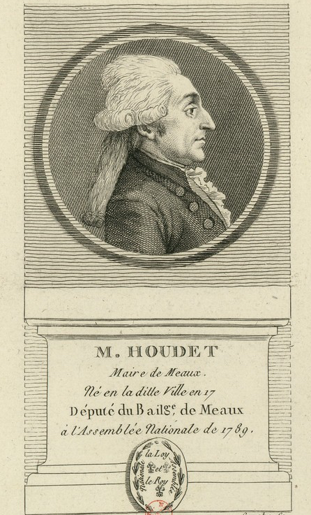 Député du tiers aux Etats-Généraux de 1789 par le bailliage de Meaux